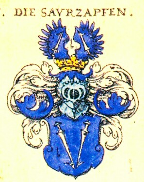 Wappen derer Saurzapf, einem bayerischen Adelsgeschlecht